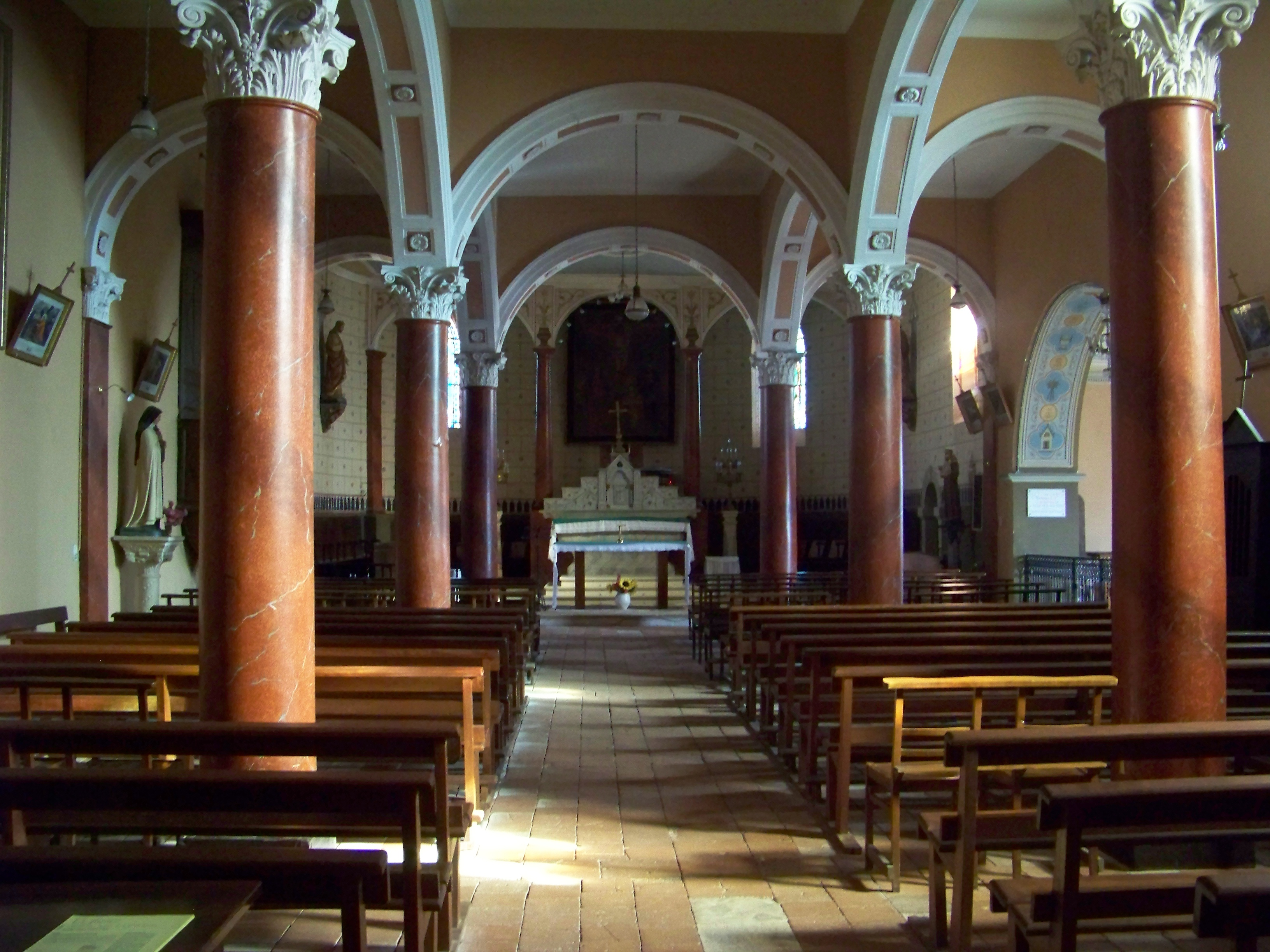 Église Saint-Philippe-et-Saint-Jacques de Buanes